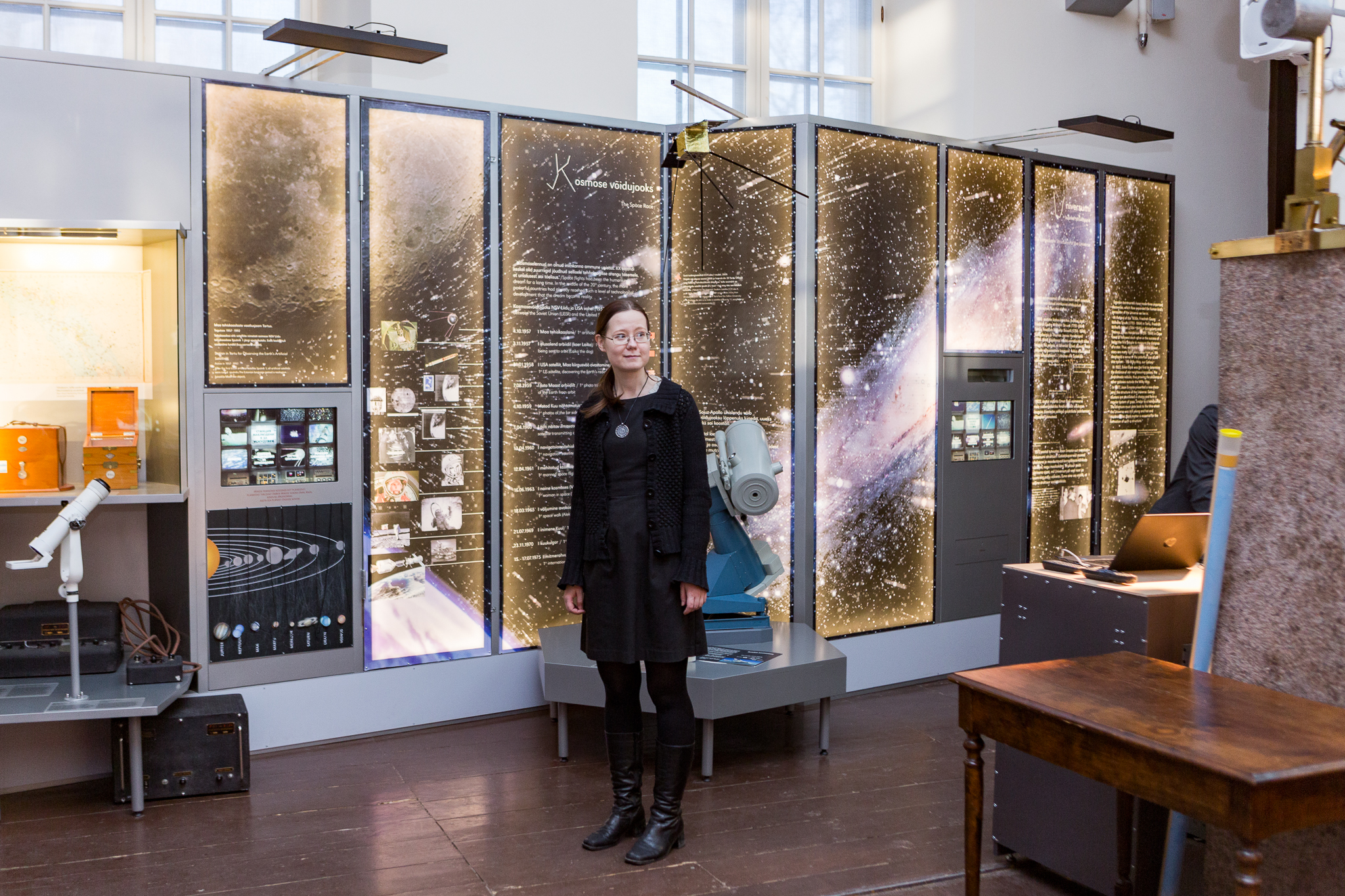 Teadusfoto 2015 lõpetamine. Tartu Tähetorni juhataja Janet Laidla.